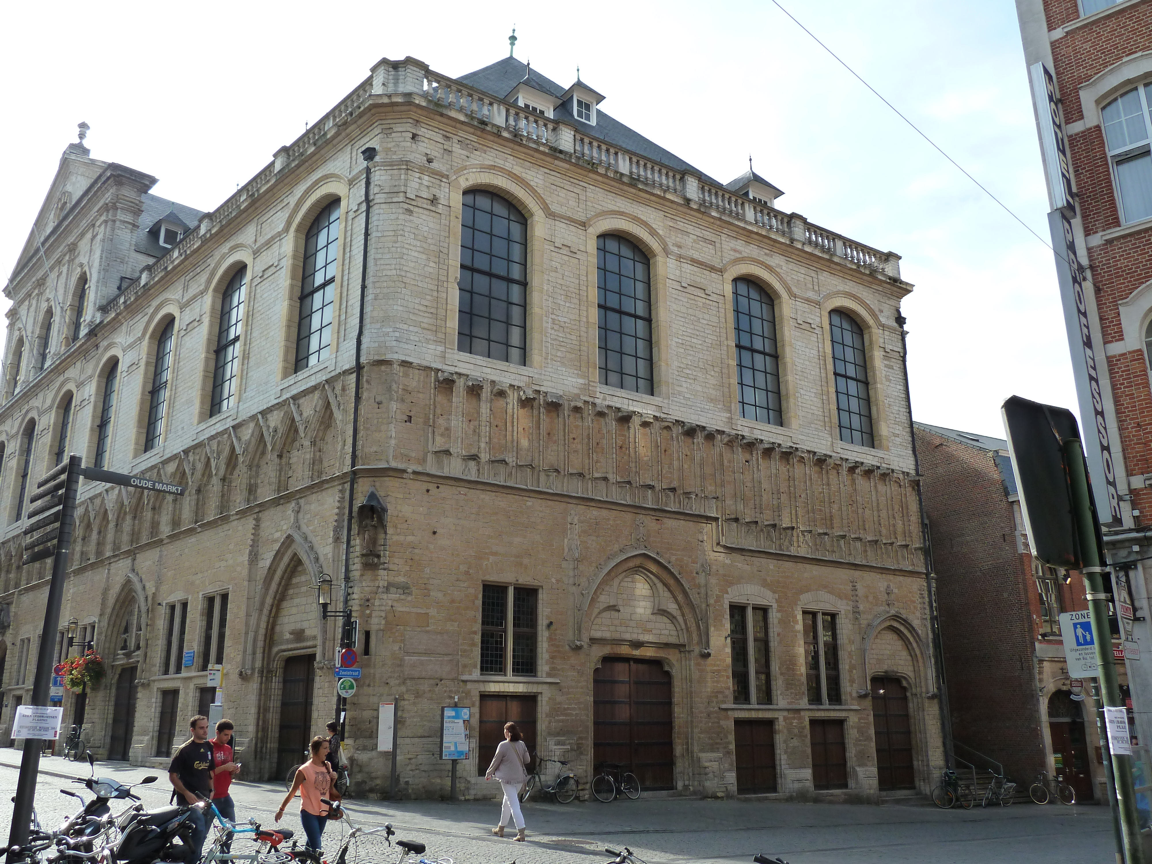 Universiteitshal, Naamsestraat 22, Leuven, België